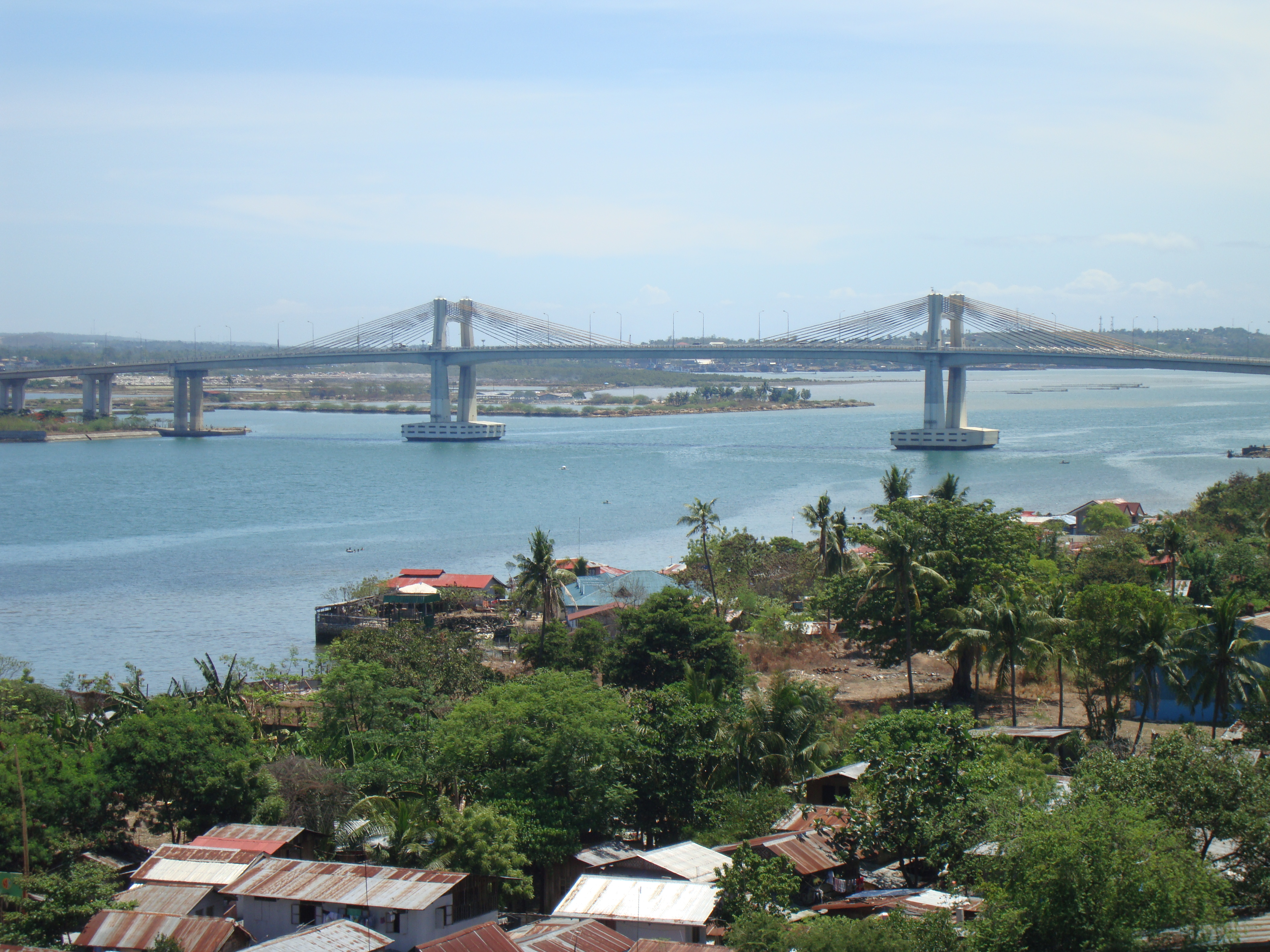 CEBU MACTAN